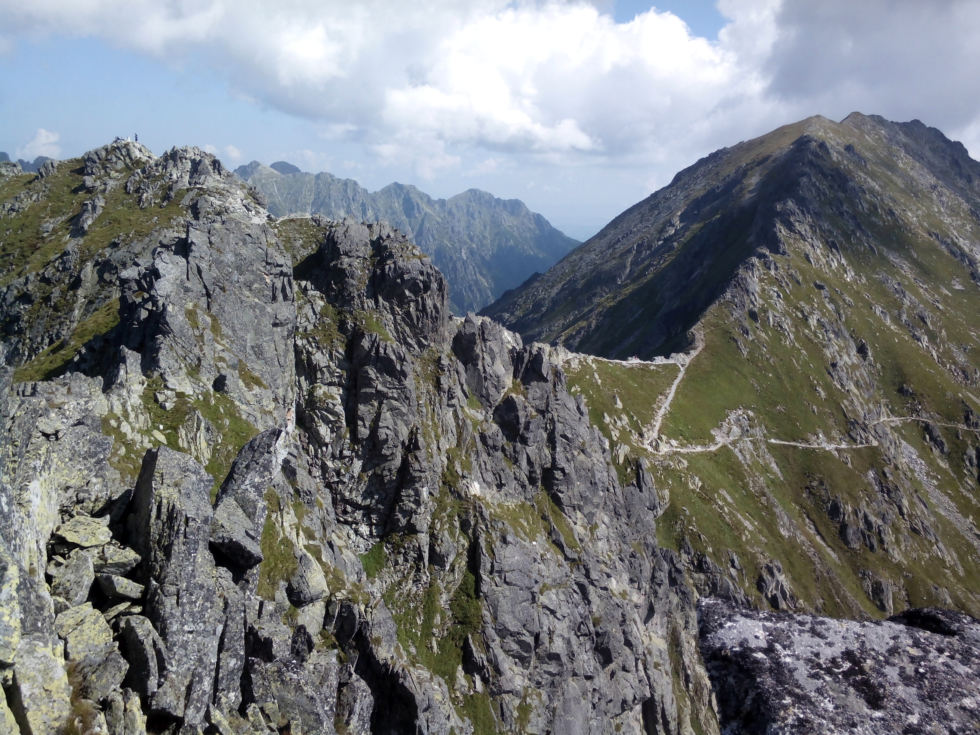 Szpiglasowy Wierch, Szpiglasowa Przełęcz i Miedziane